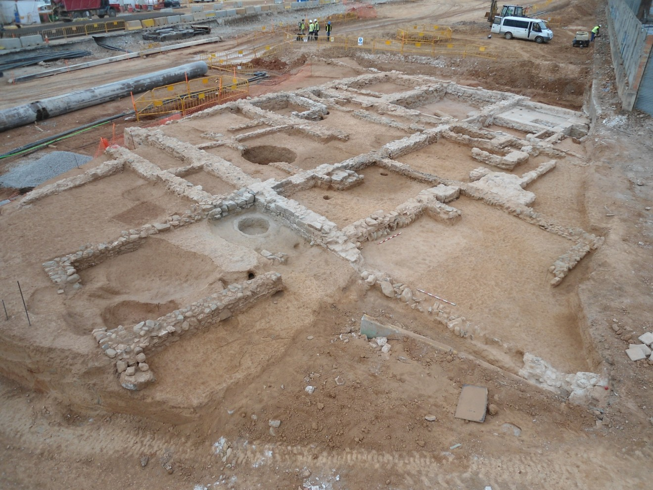 Vista general de l’antiga masia de Can Iglésies. Foto: Imma Mesas